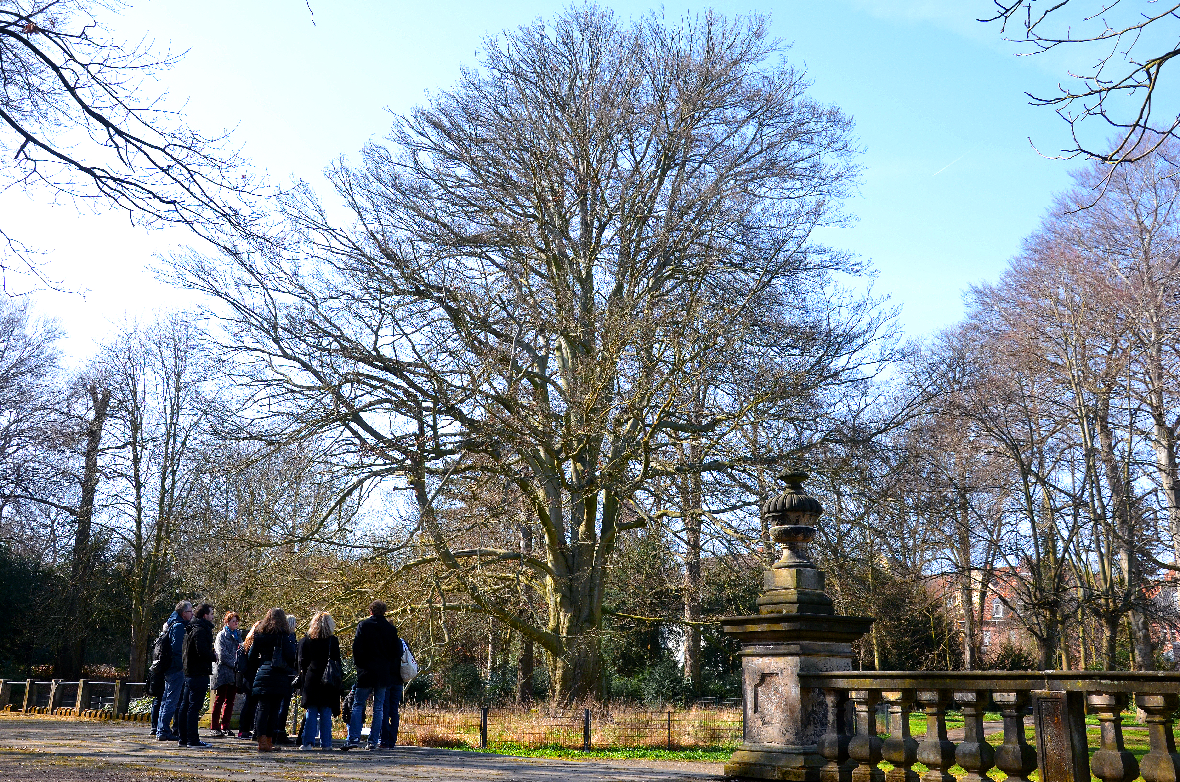 Eine geführte Besuchergruppe am Samstag vor Ostern 2016 auf der ehemaligen Terrasse von Schloss Linden mit Blick in Richtung des Gartenparterres auf die im Jahr 1830 gepflanzte Von-Alten-Buche ...